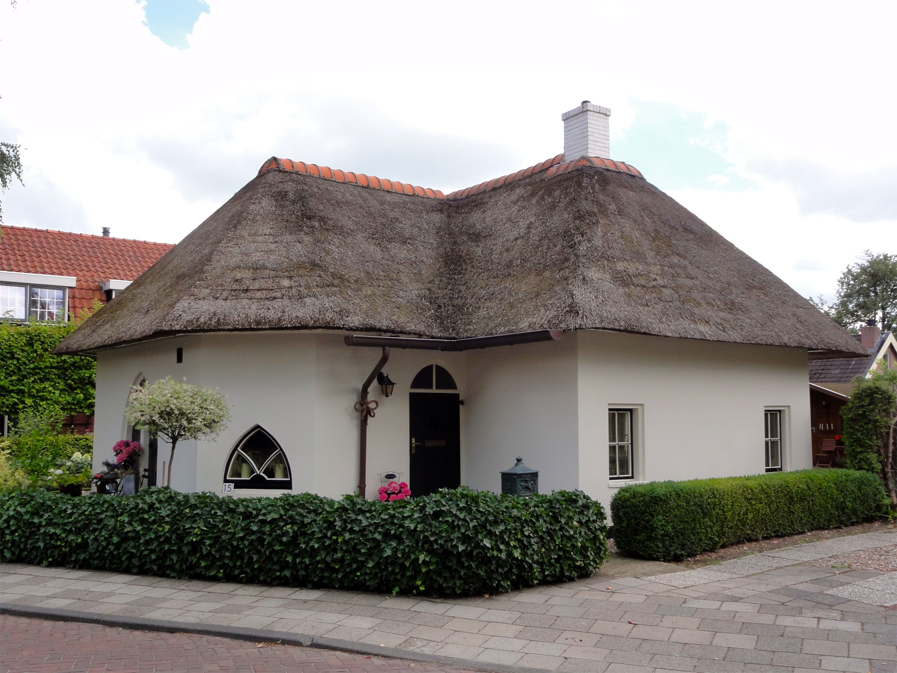 Voormalige commiezenhuis, Molenlaan 15 Beetsterzwaag